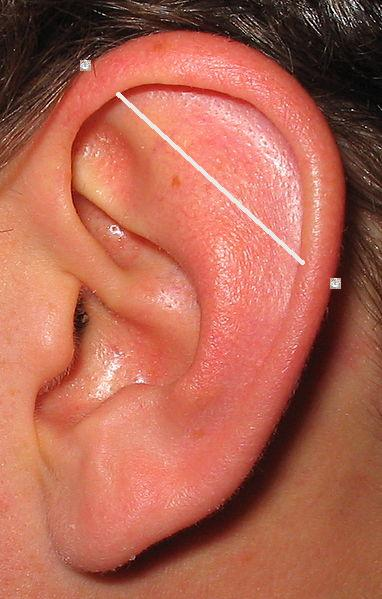 Piercing industrial.